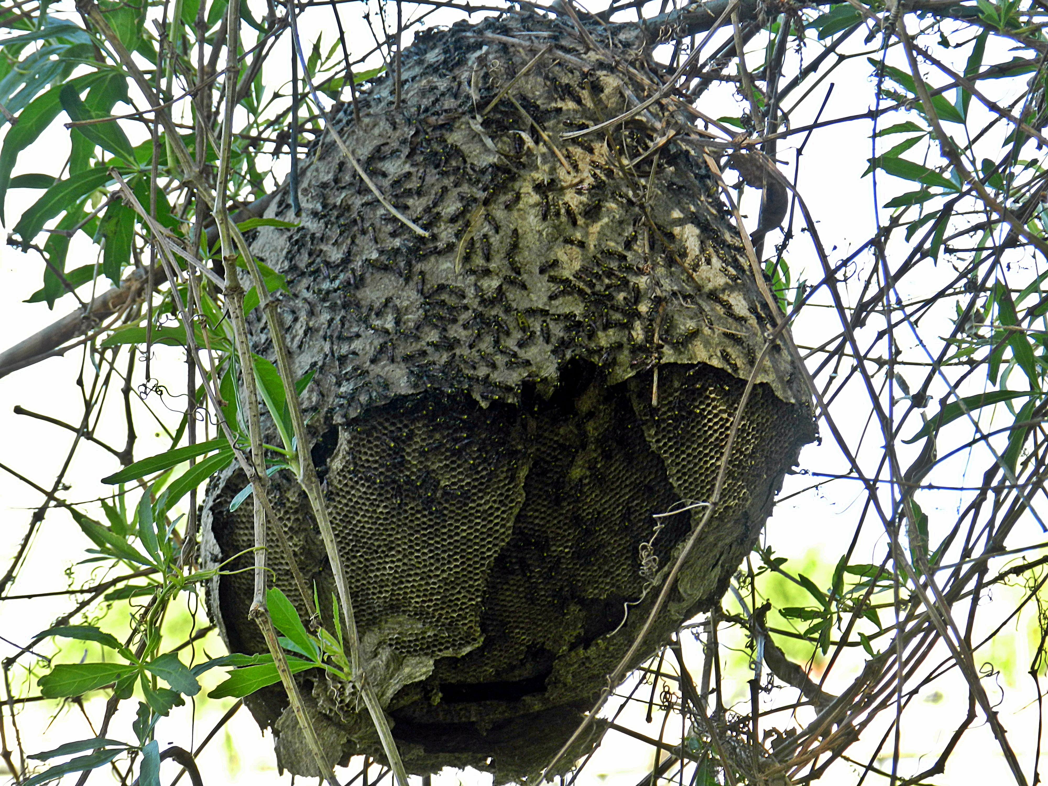 Nido de cartón donde se ven los panales y las avispas